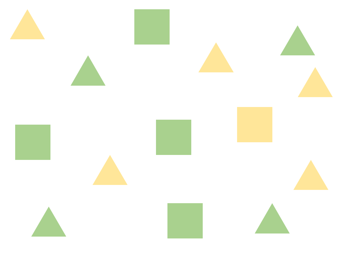 Conjunction Search